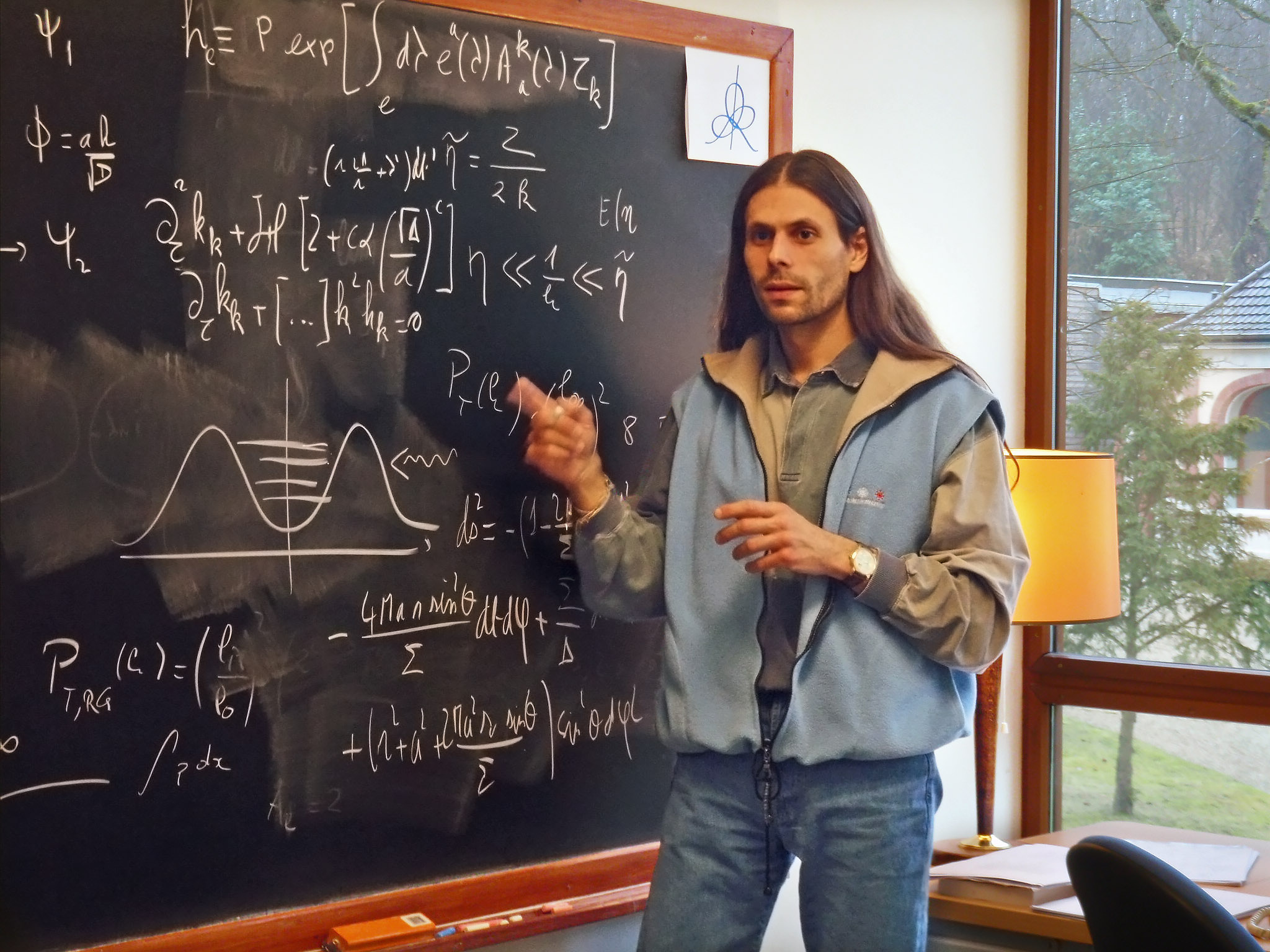 Aurélien Barrau bei einer Vorlesung am IHÉS (Paris)